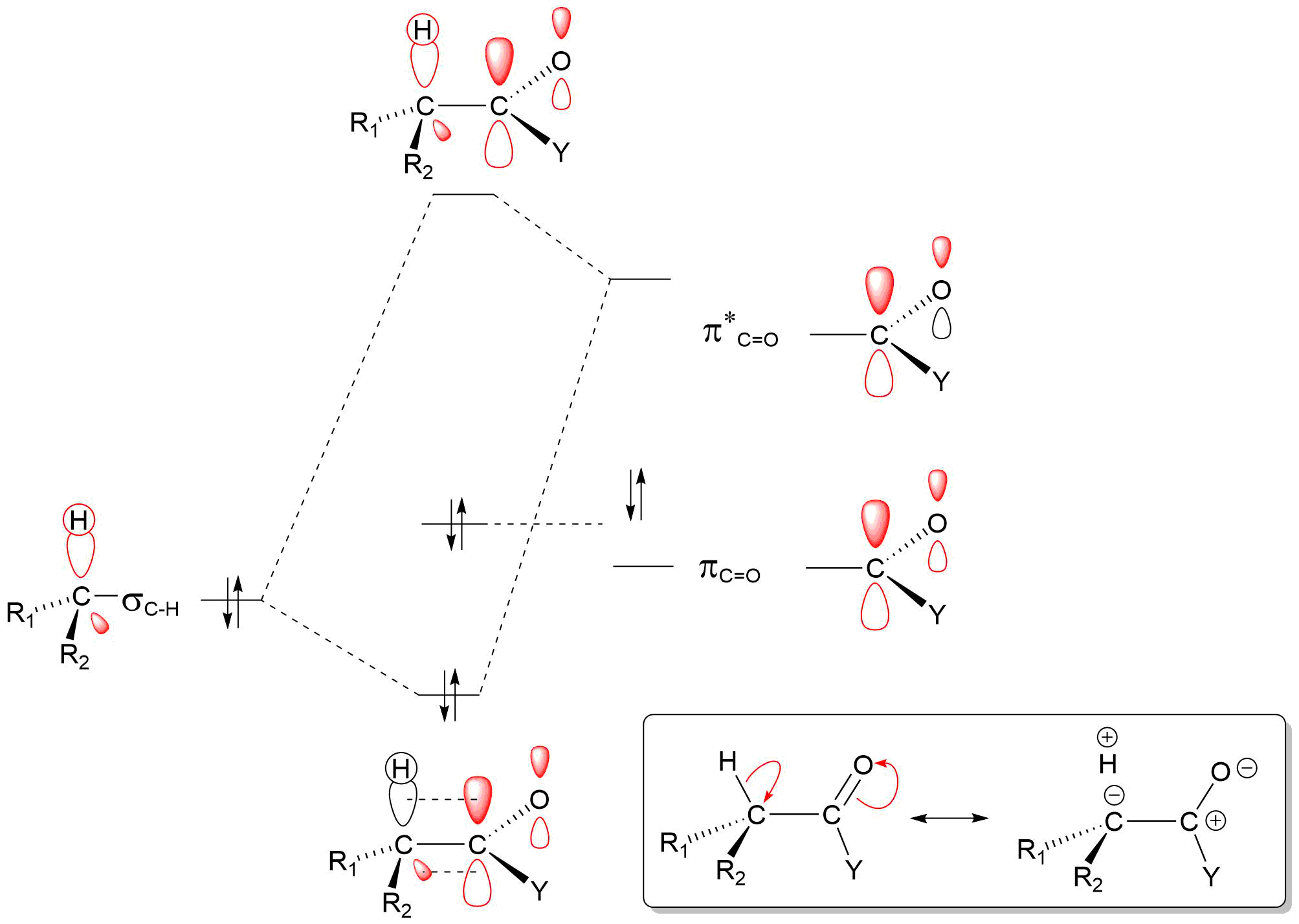 Orbitais moleculares formados devido a hiperconjugacao entre o a ligacao do carbono alfa com hidrogenio e a ligacao com carbonila